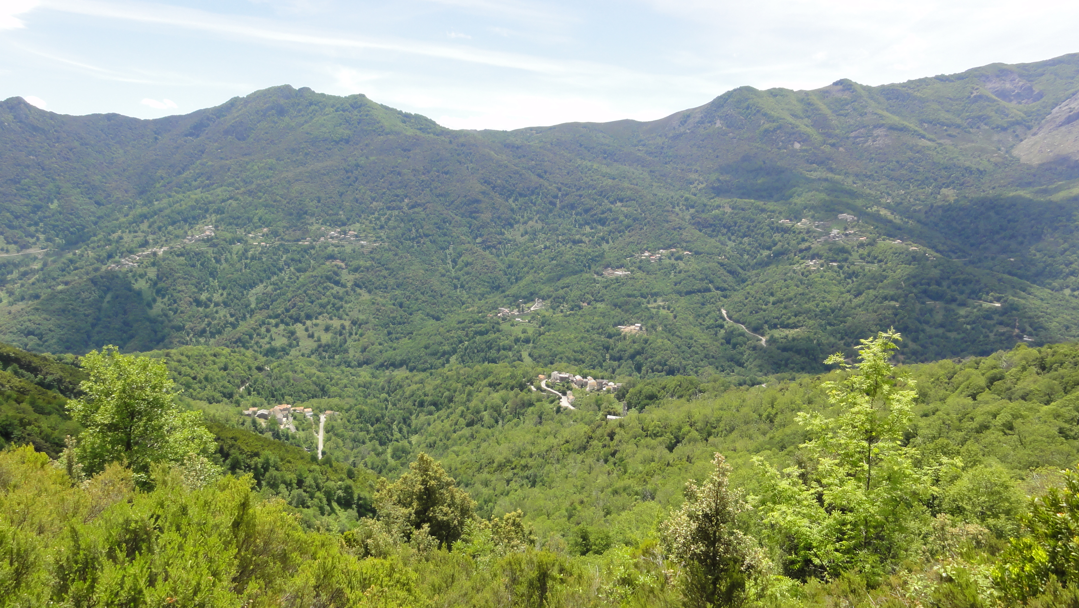 20234 Valle-d'Alesani, France